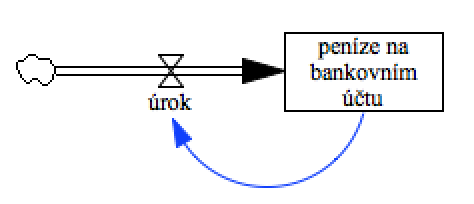 SFD akumulace v programu Vensim